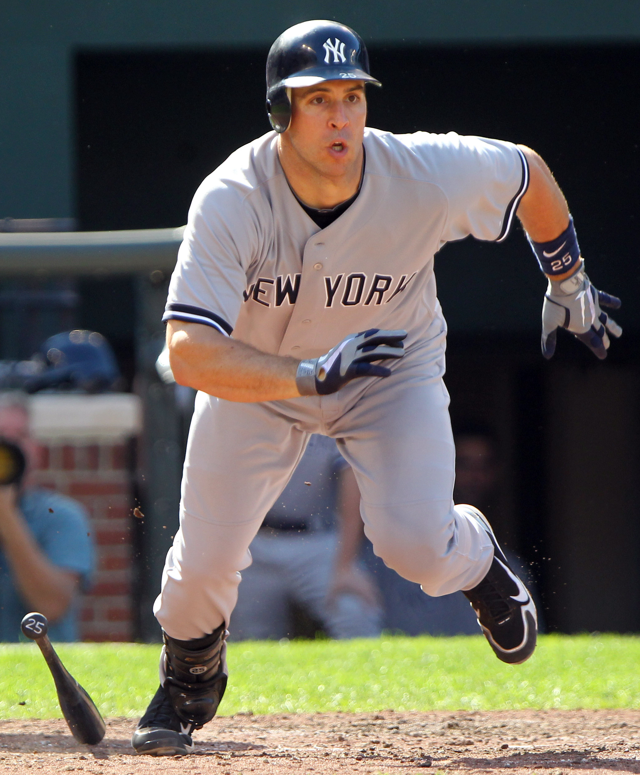 Mark Teixeira